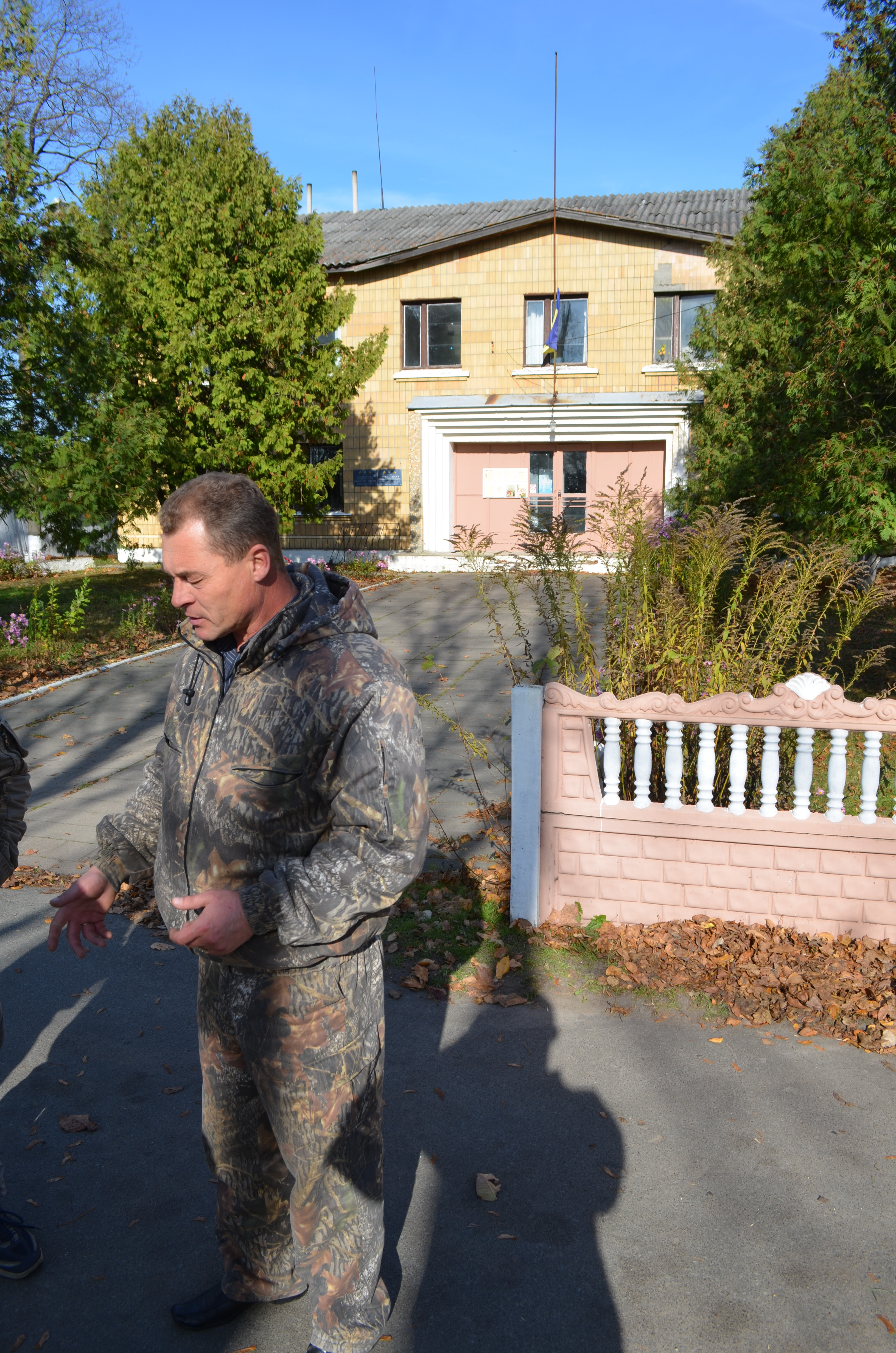 Остапчук Олександр Васильович - сільський голова села Бондарівка Коростенського району